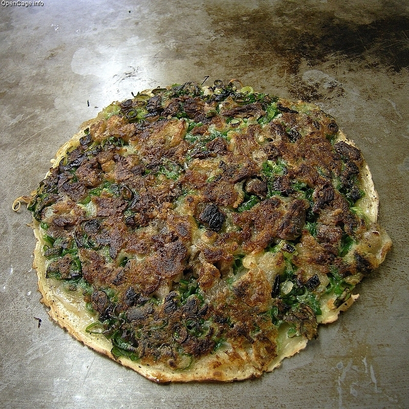 兵庫県地域のお好み焼きである「にくてん」